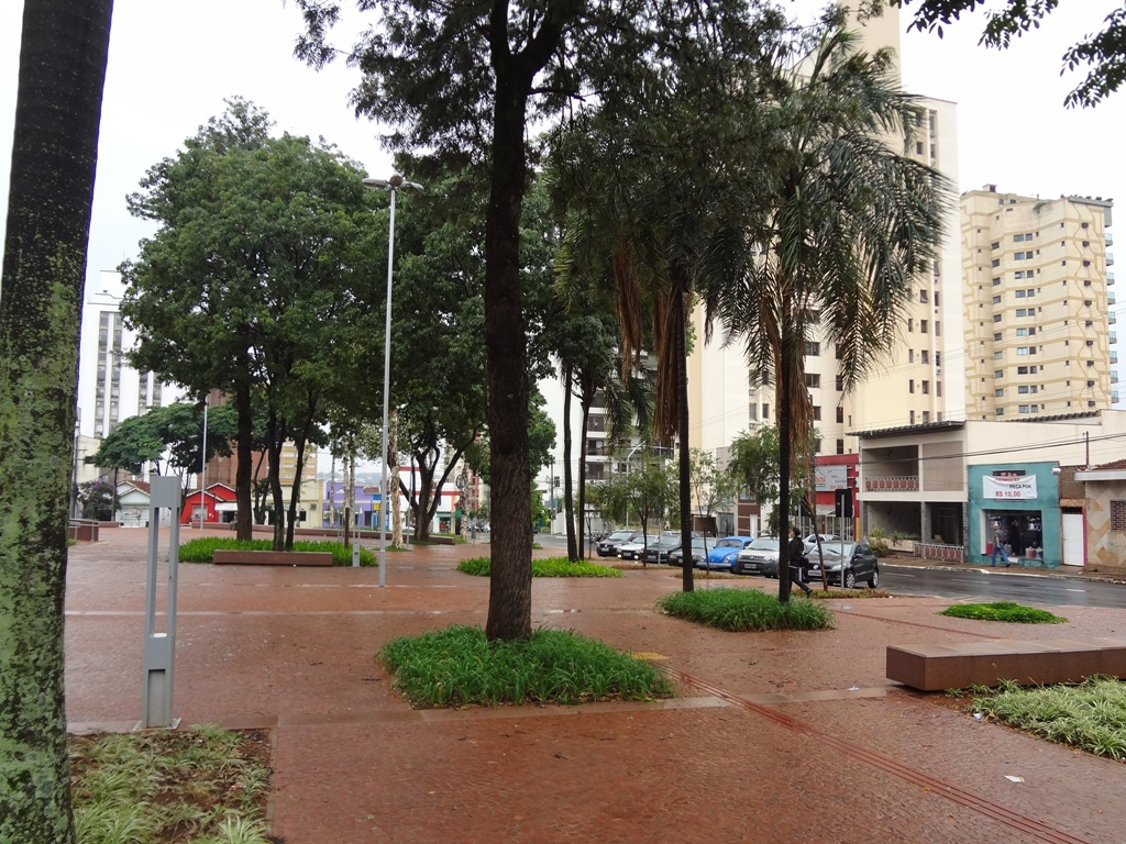 Centro da cidade de Catanduva, SP